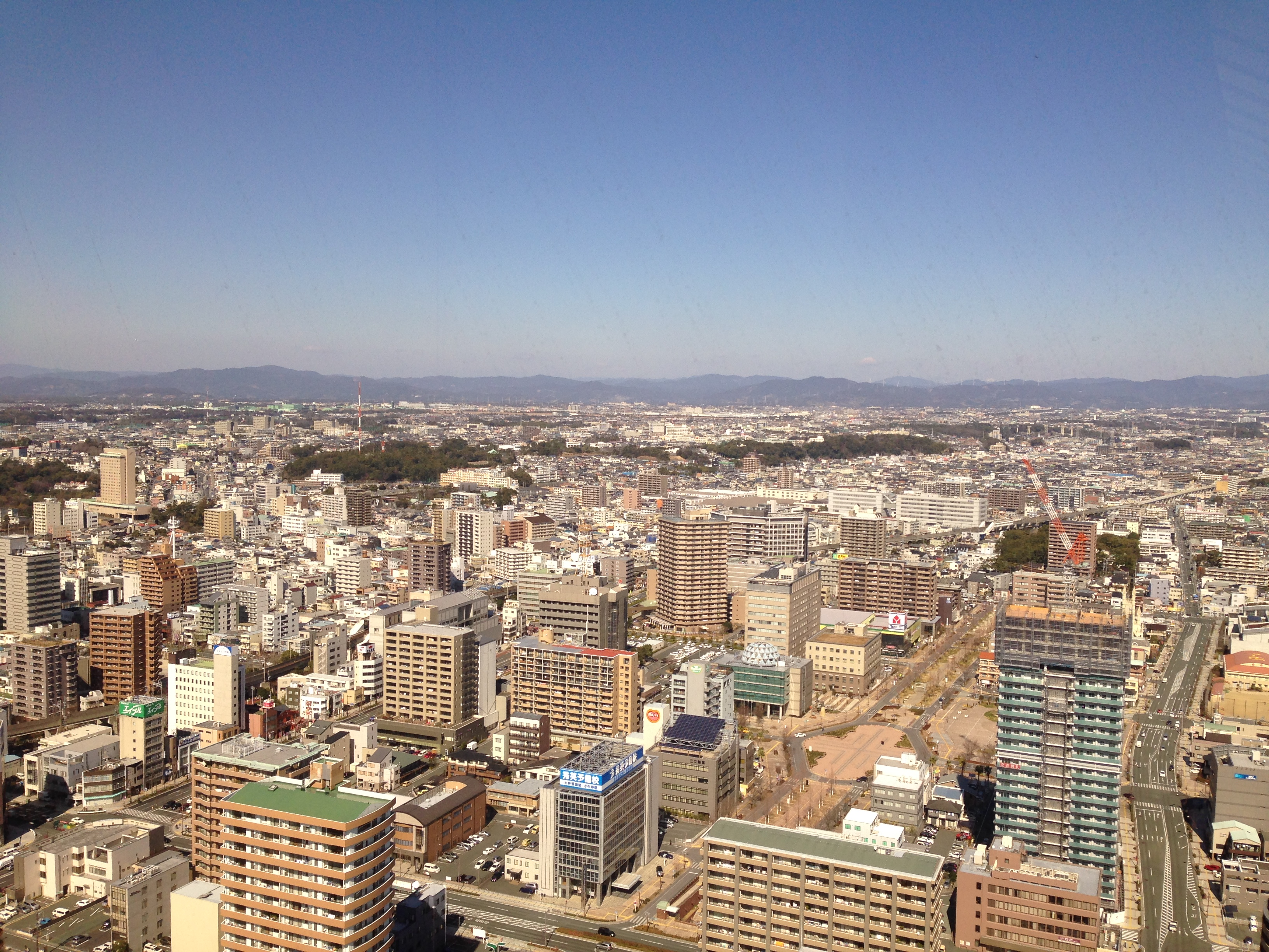 Hamamatsu view